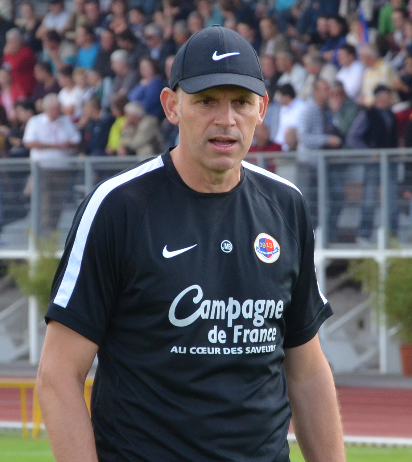 Photographie prise à l'occasion de la rencontre amicale opposant le Stade Malherbe de Caen au Stade rennais, le 9 juillet 2014 au stade Pierre-Comte de Vire. Ici, Jean-Marc Branger.